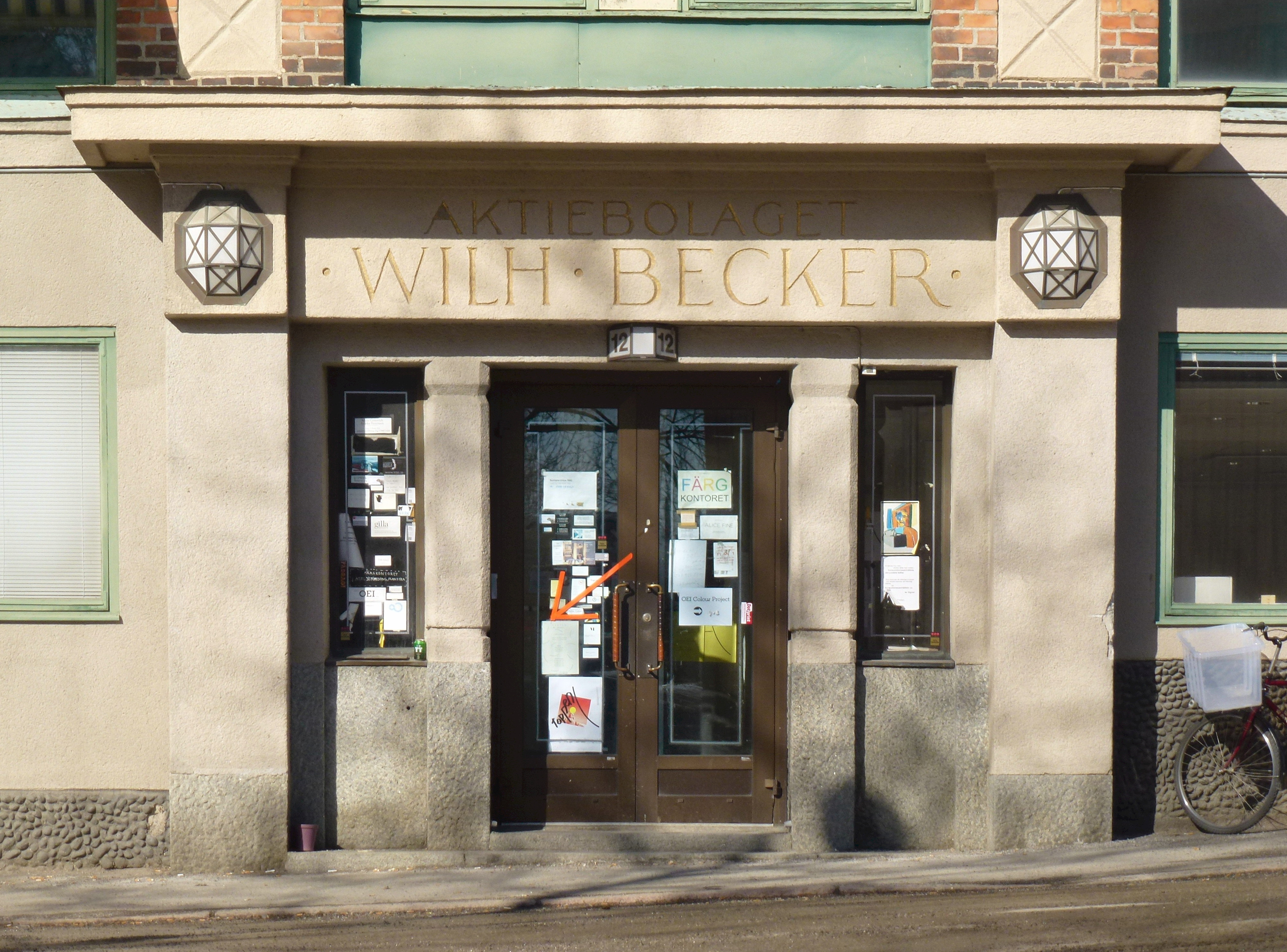 Huvudentrén till Wilhelm Beckers gamla kontorsbyggnad på Lövholmen, Liljeholmen i Stockholm